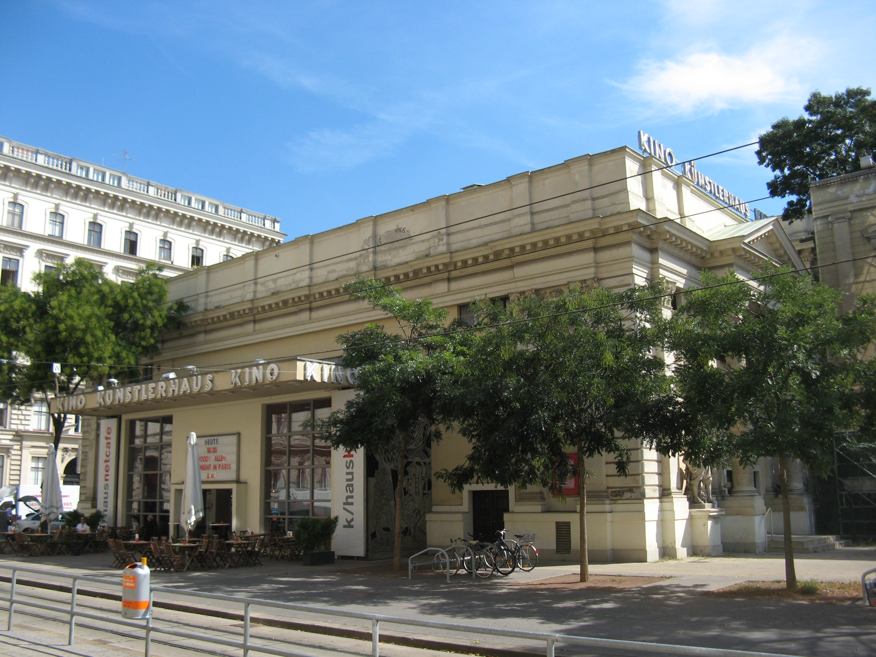 Künstlerhauskino, erbaut 1947-49 von Alfons Hetmanek, Akademiestraße 13, Wien-Innere Stadt